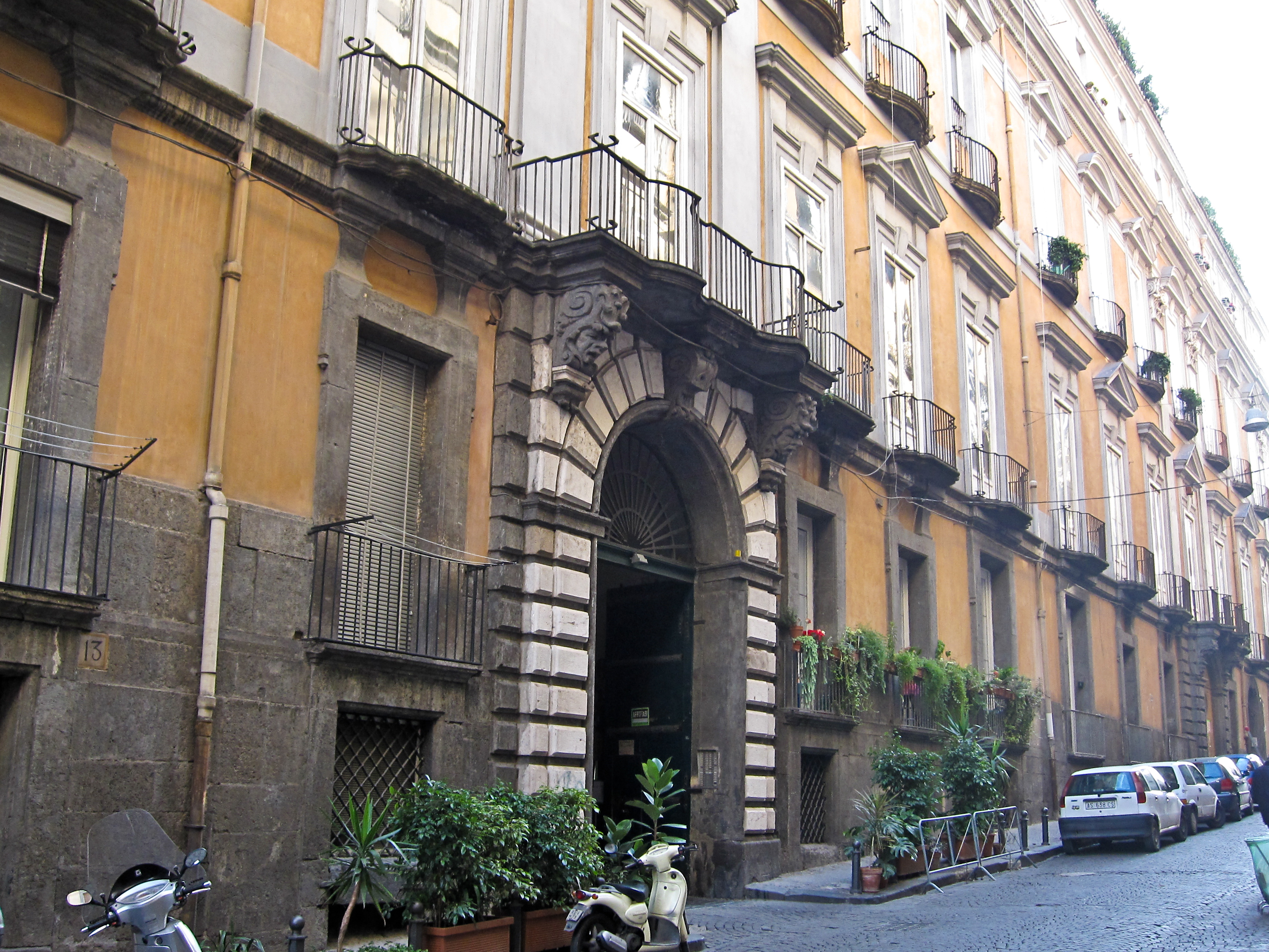 Via Monte di Dio con l'ingresso del palazzo. Palazzo Serra di Cassano - Napoli.